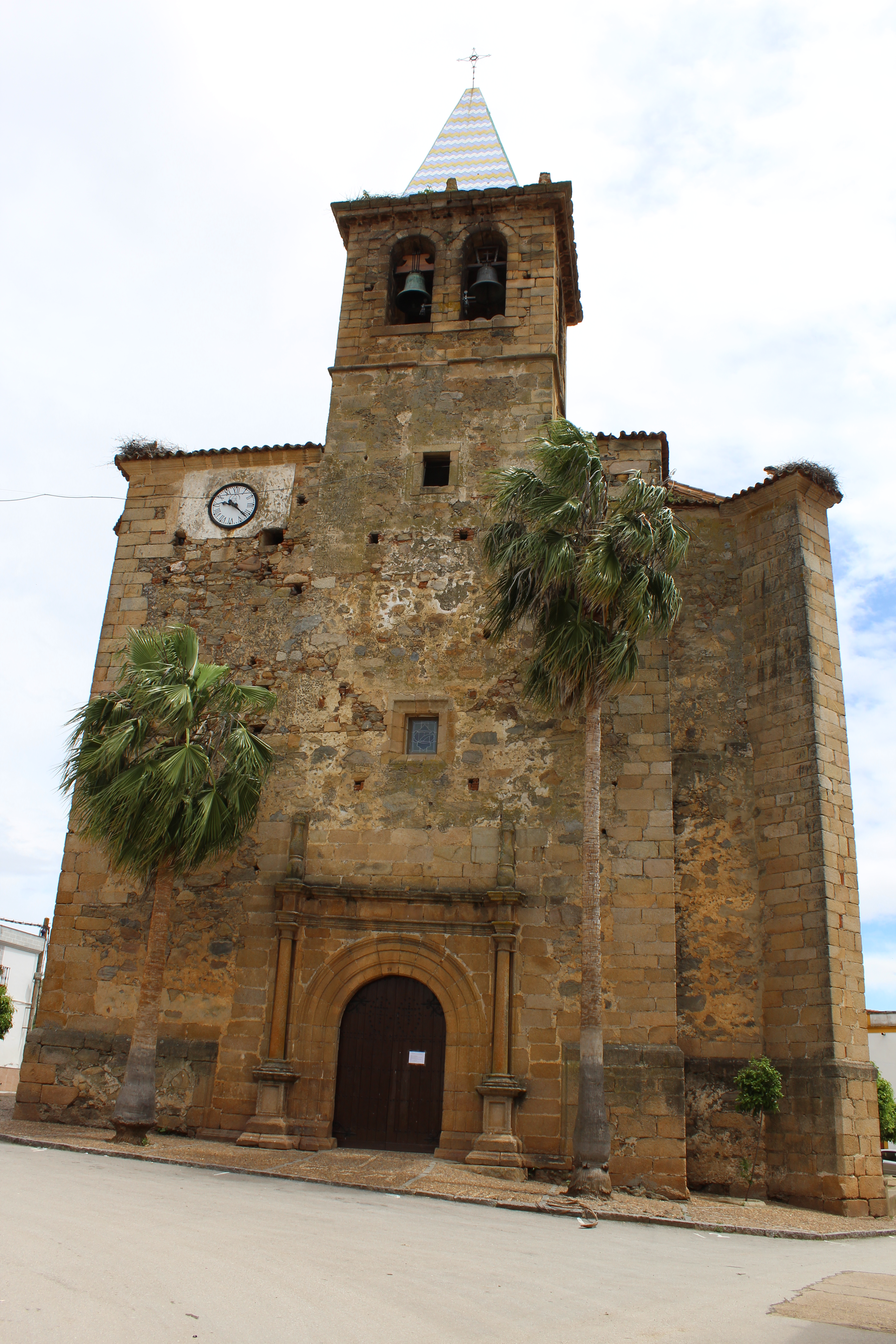 Fachada de laIglesia parroquial de Santa Marina en Valverde de Mérida